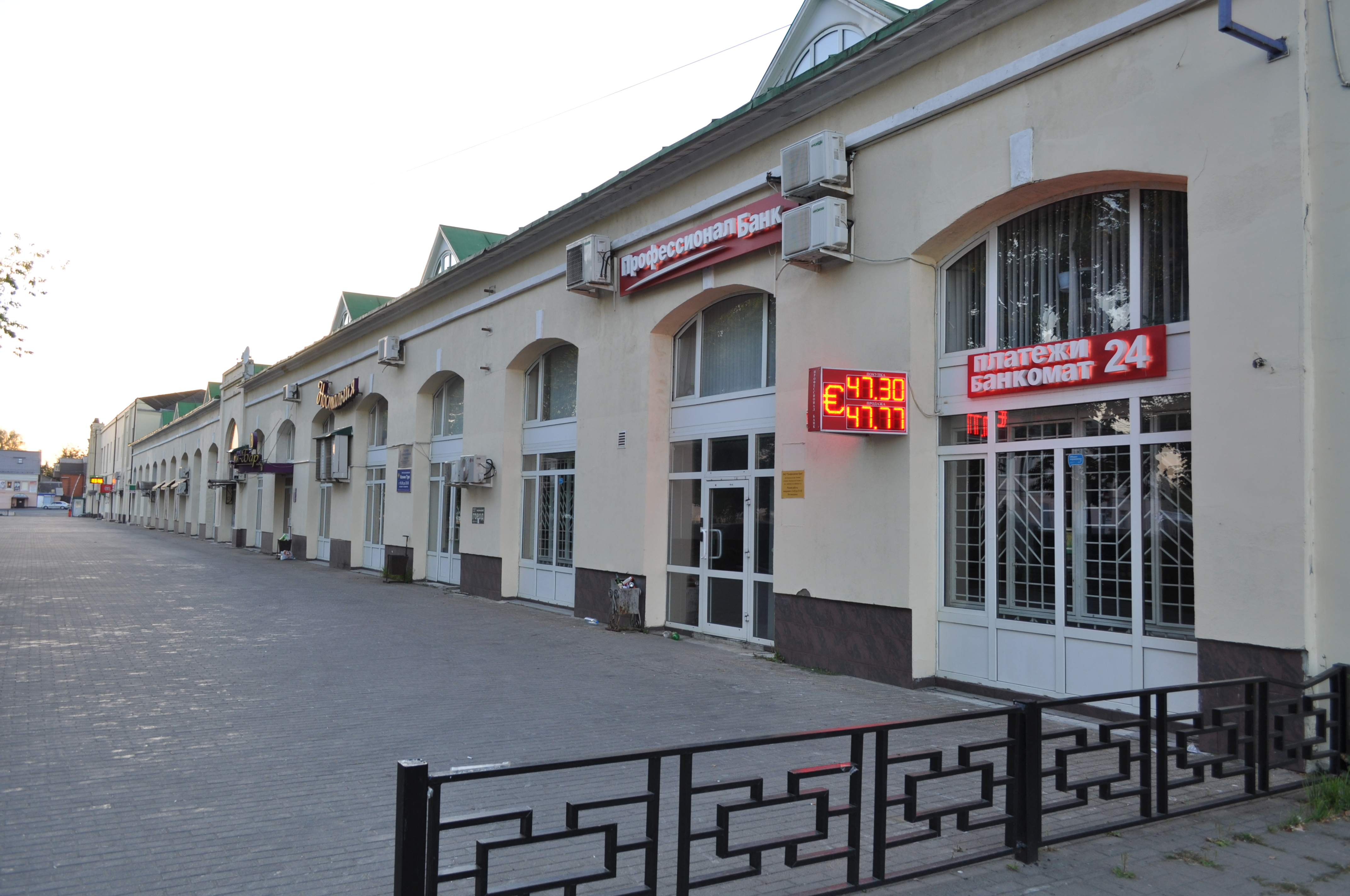 Торговые ряды в Можайске после реставрации